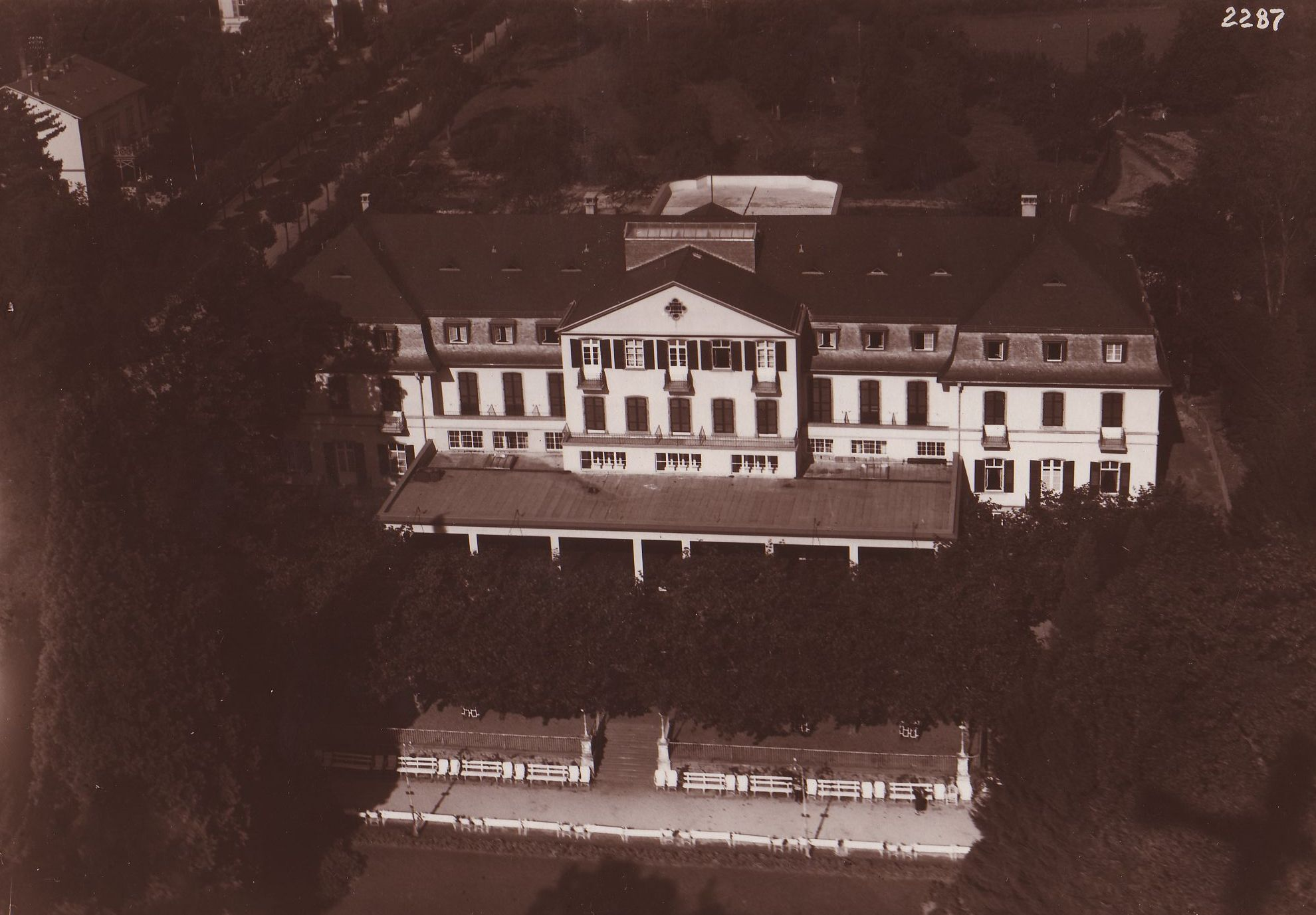 Das alte Kurhaus in Bad Soden am Taunus kurz nach seiner Eröffnung im Jahr 1927.